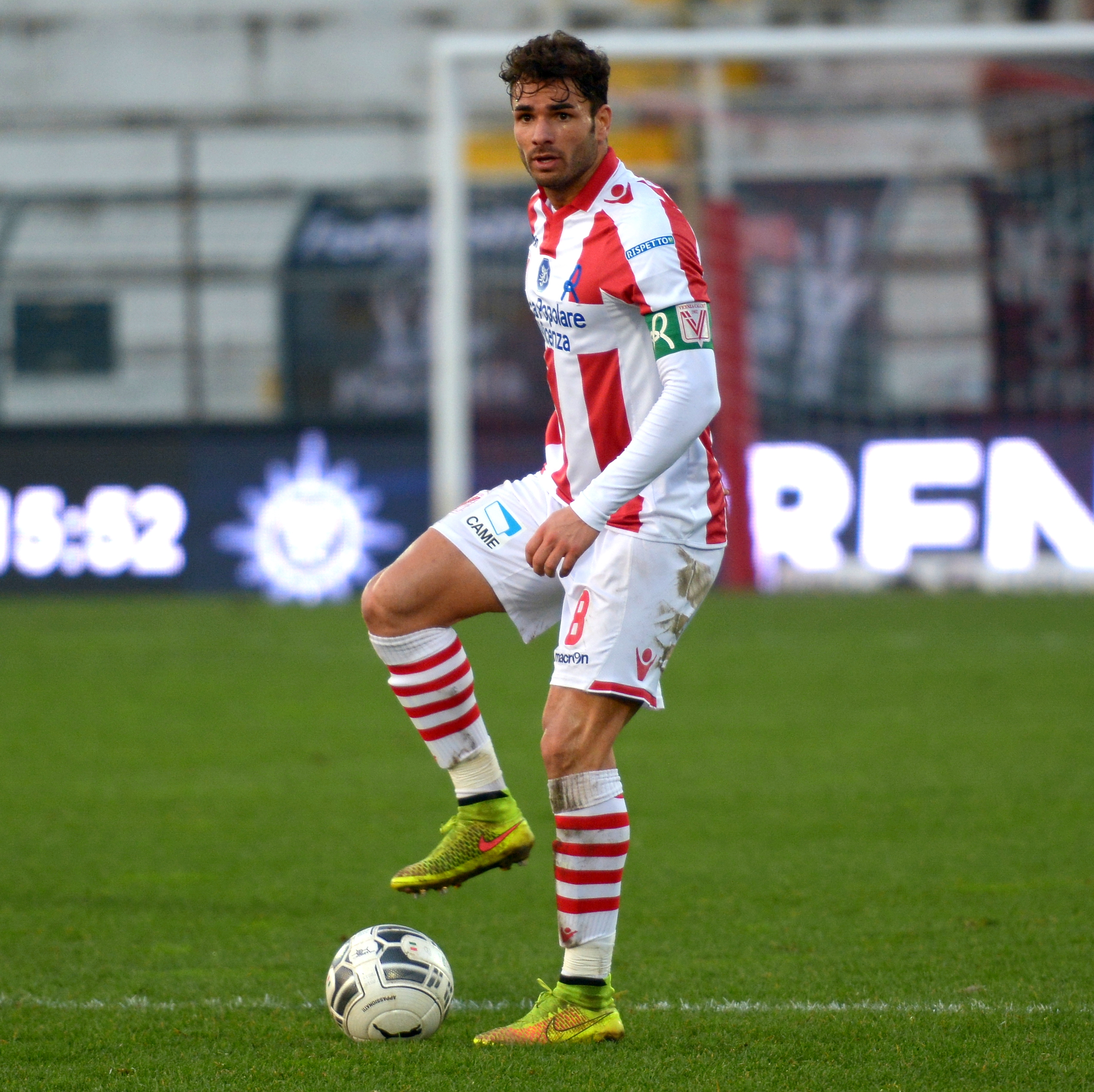 Antonio Cinelli, centrocampista romano